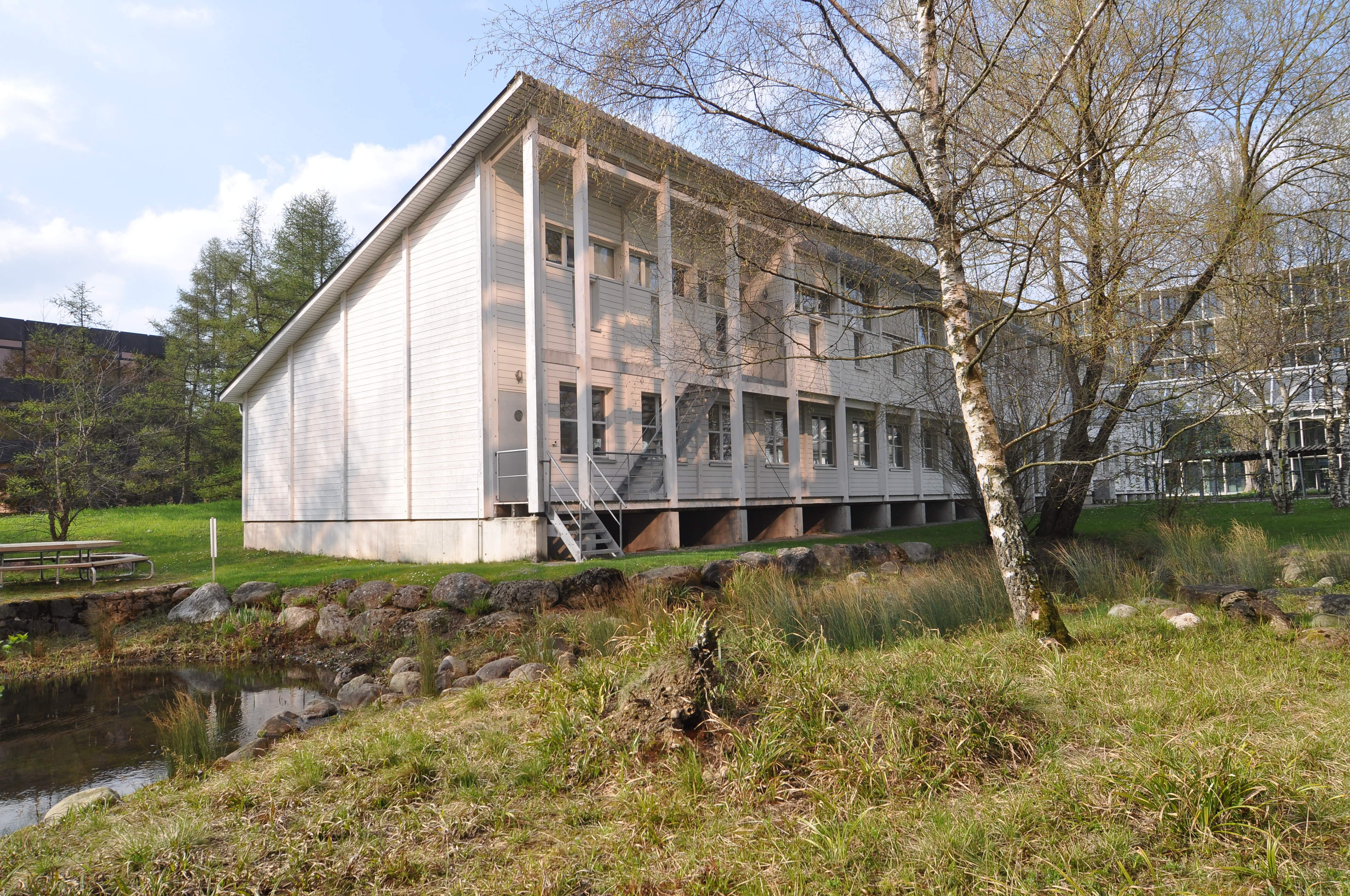 Provisorium für die Zeichensäle der ETH auf dem Hönggerberg, einer von drei gleichen Zeilenbauten, errichtet 1987, Architekt: Benedikt Huber, ausgezeichnet mit dem Preis für Gute Bauten der Stadt Zürich